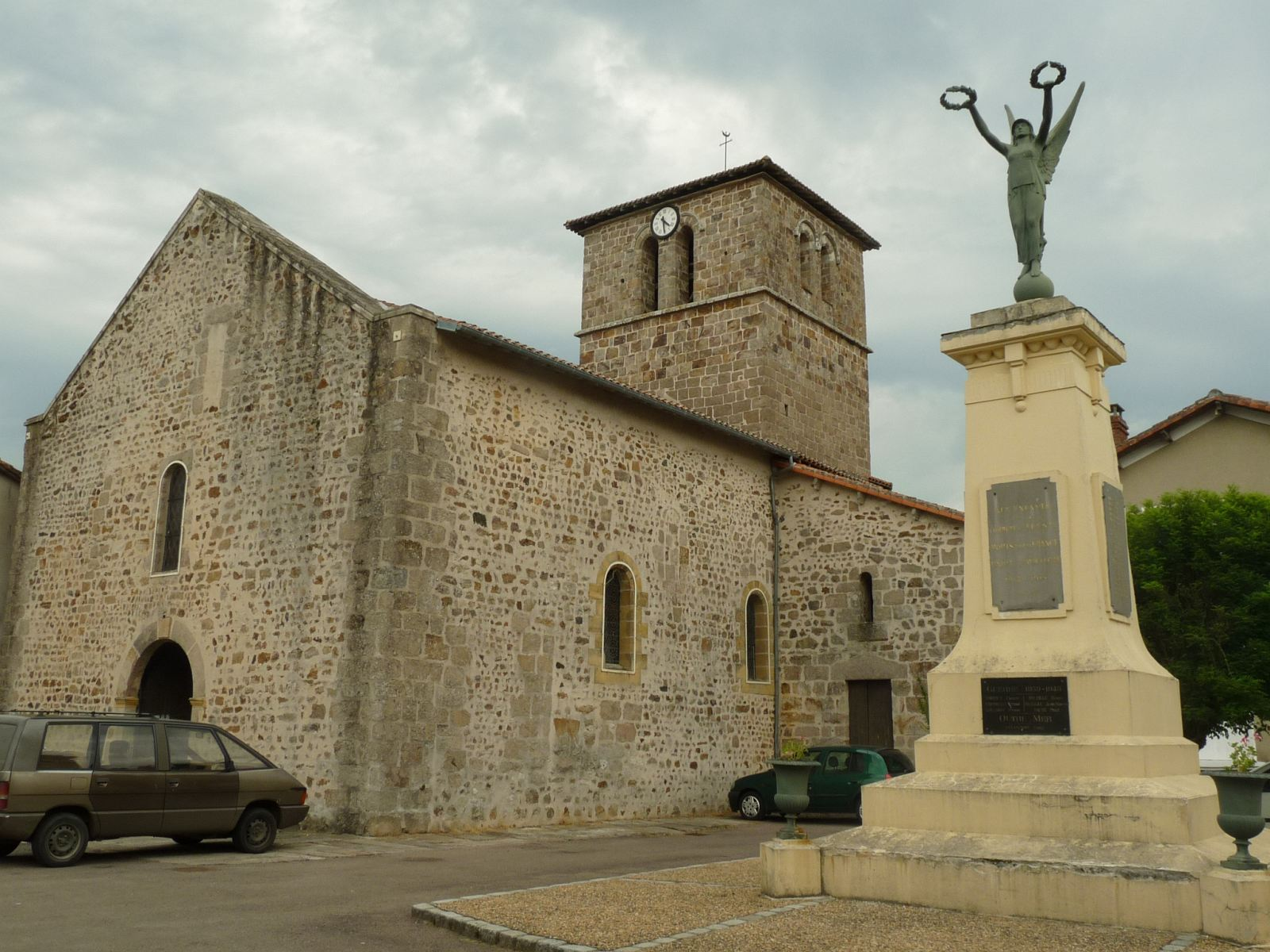 église de Lessac, Charente, France